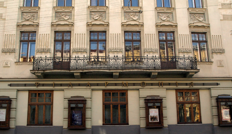 Фото Львівської обласної філармонії. Вид вхід